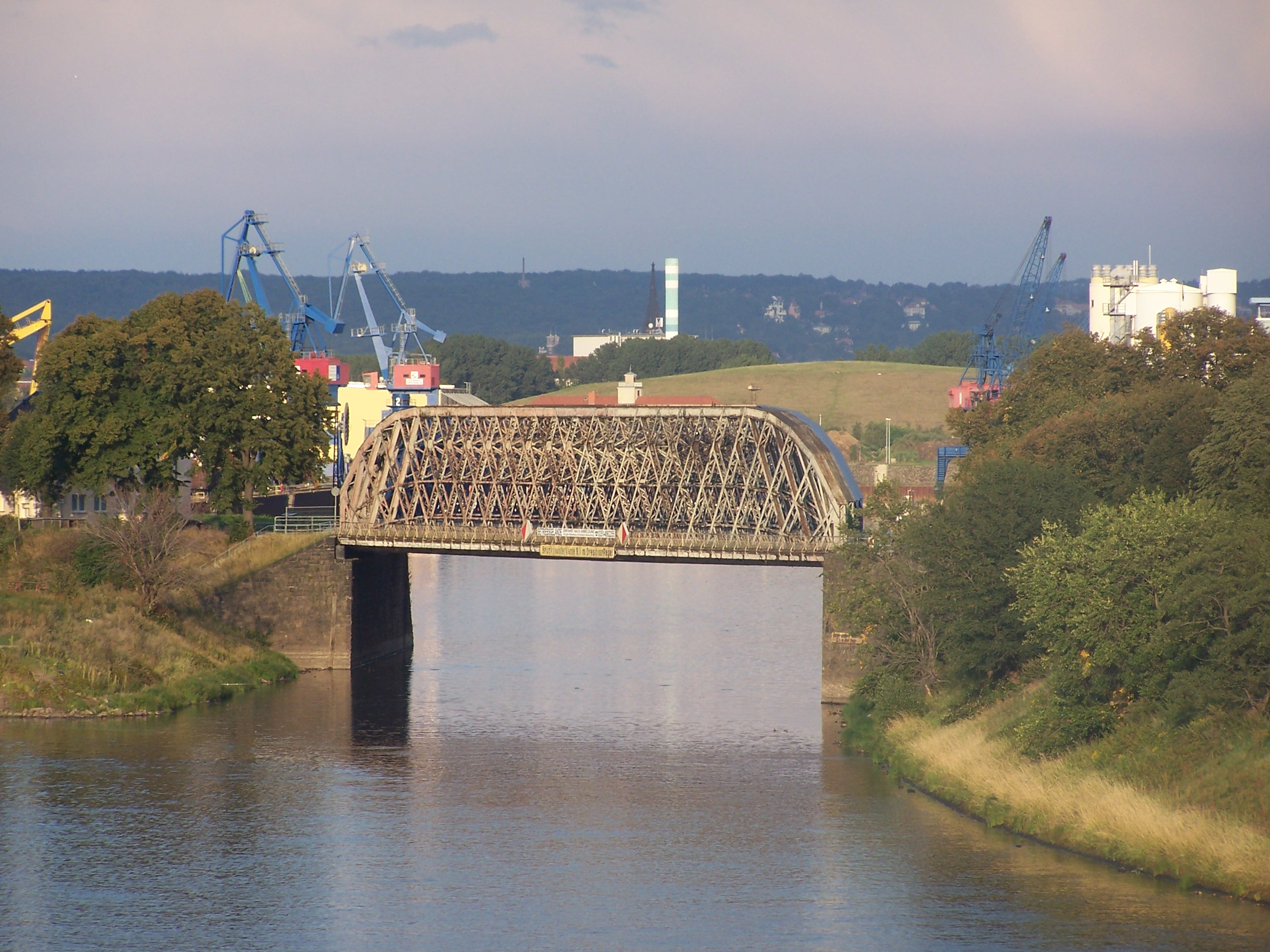 Hafeneinfahrt des Alberthafens in Dresden-Friedrichstadt